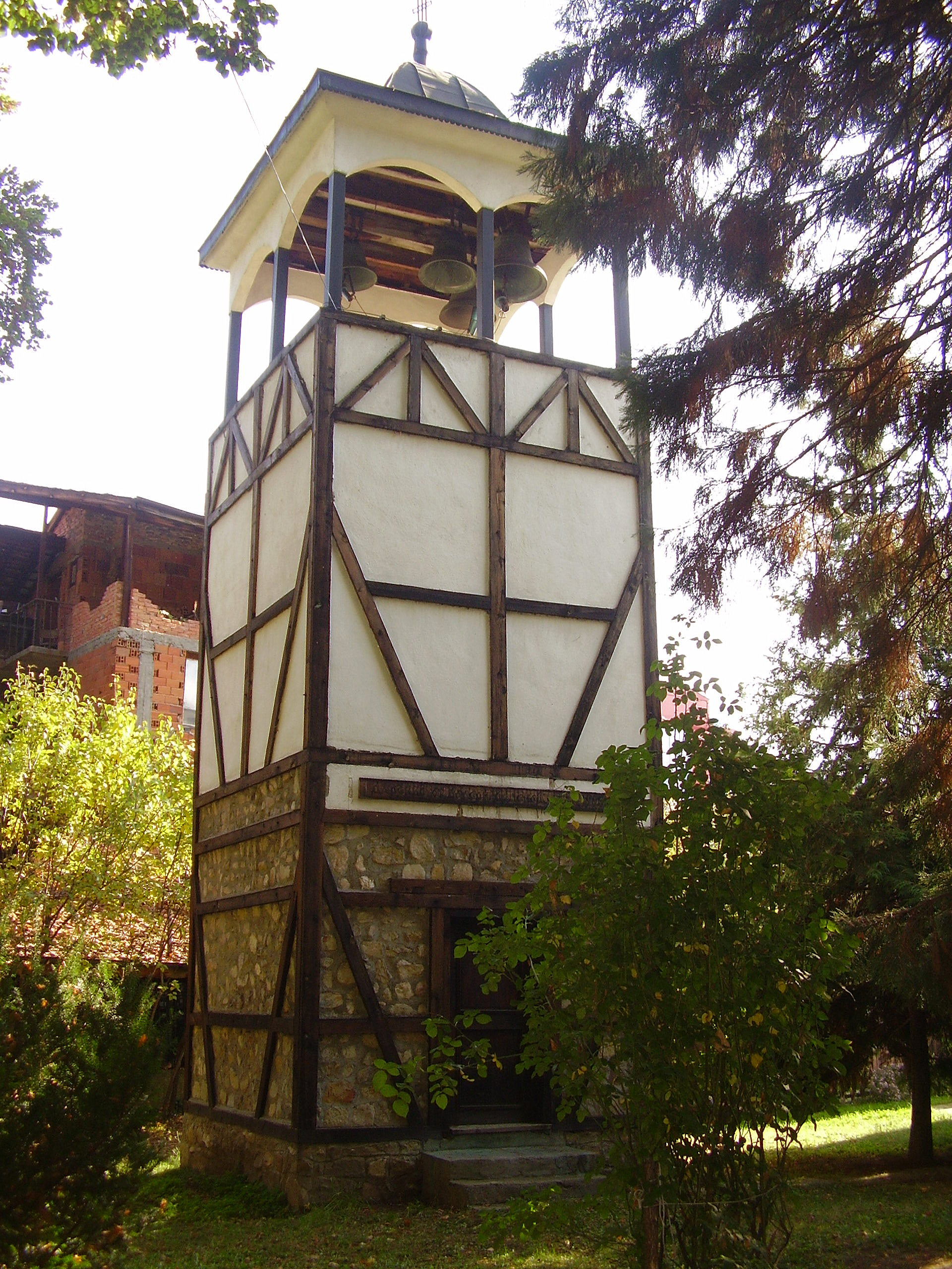 Камбанарията на църквата "Успение Богородично" - Кюстендил